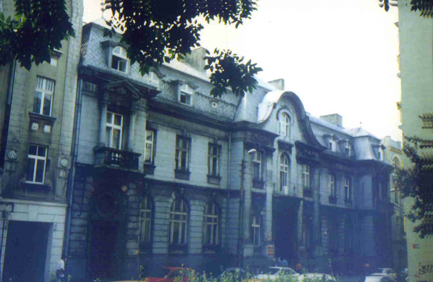 Autor:Zuber